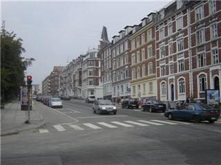 Trøjborg